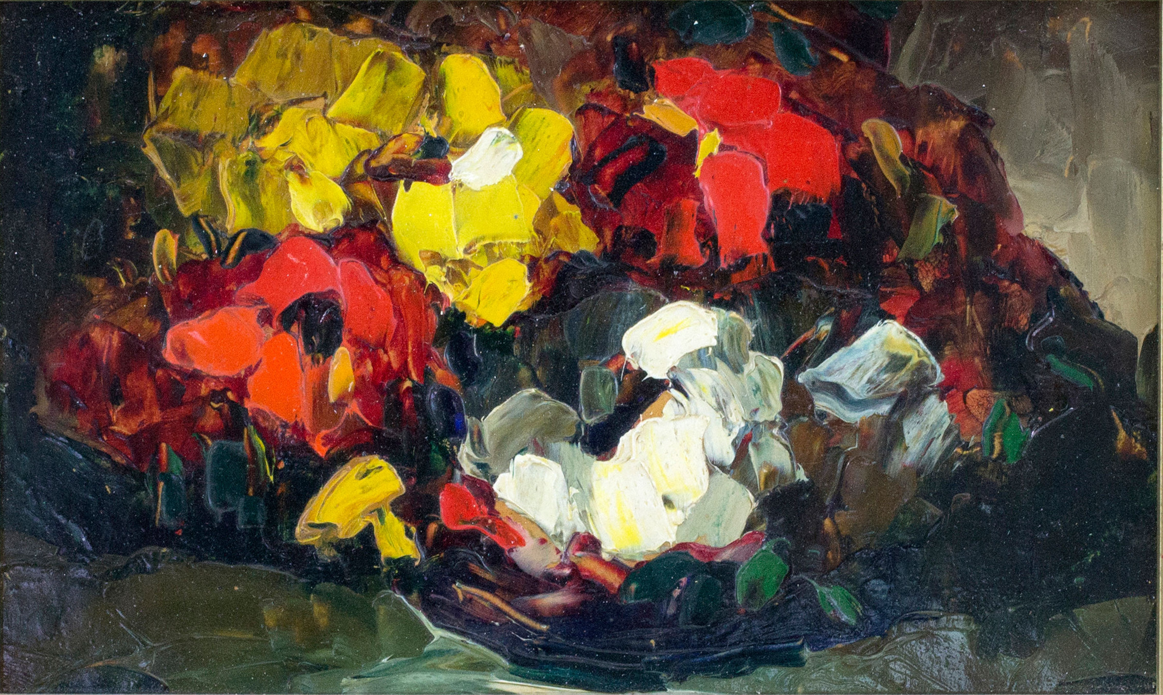 Bouquet de Zinnias, huile sur carton de Louis Pastour.